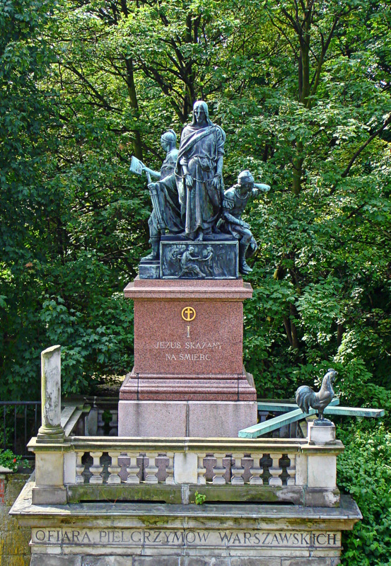 Zespół klasztorny oo. Paulinów: Kościół pw. Wniebowzięcia NMP i Znalezienia Krzyża Św. z kaplicami, zakrystią, skarbcem, wieżą, klasztorem, zabudowaniami gospodarczymi, arsenałem, drukarnią, domem muzykantów, twierdzą z bramami i bastionami, park Częstochowa, Częstochowa 02.1978.